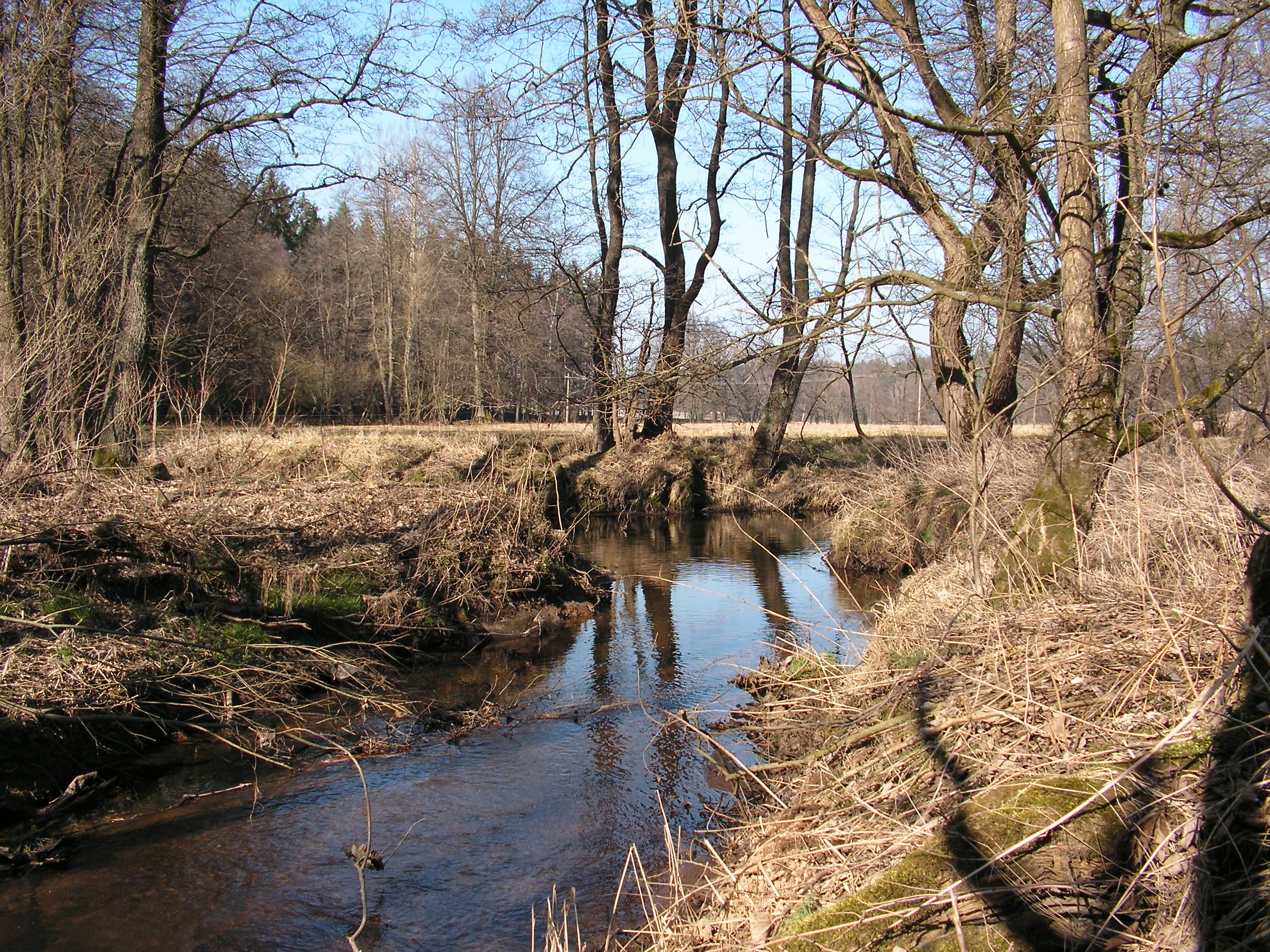 Ústí Dlouhého potoka do řeky Chrudimky pod Veselým Kopcem